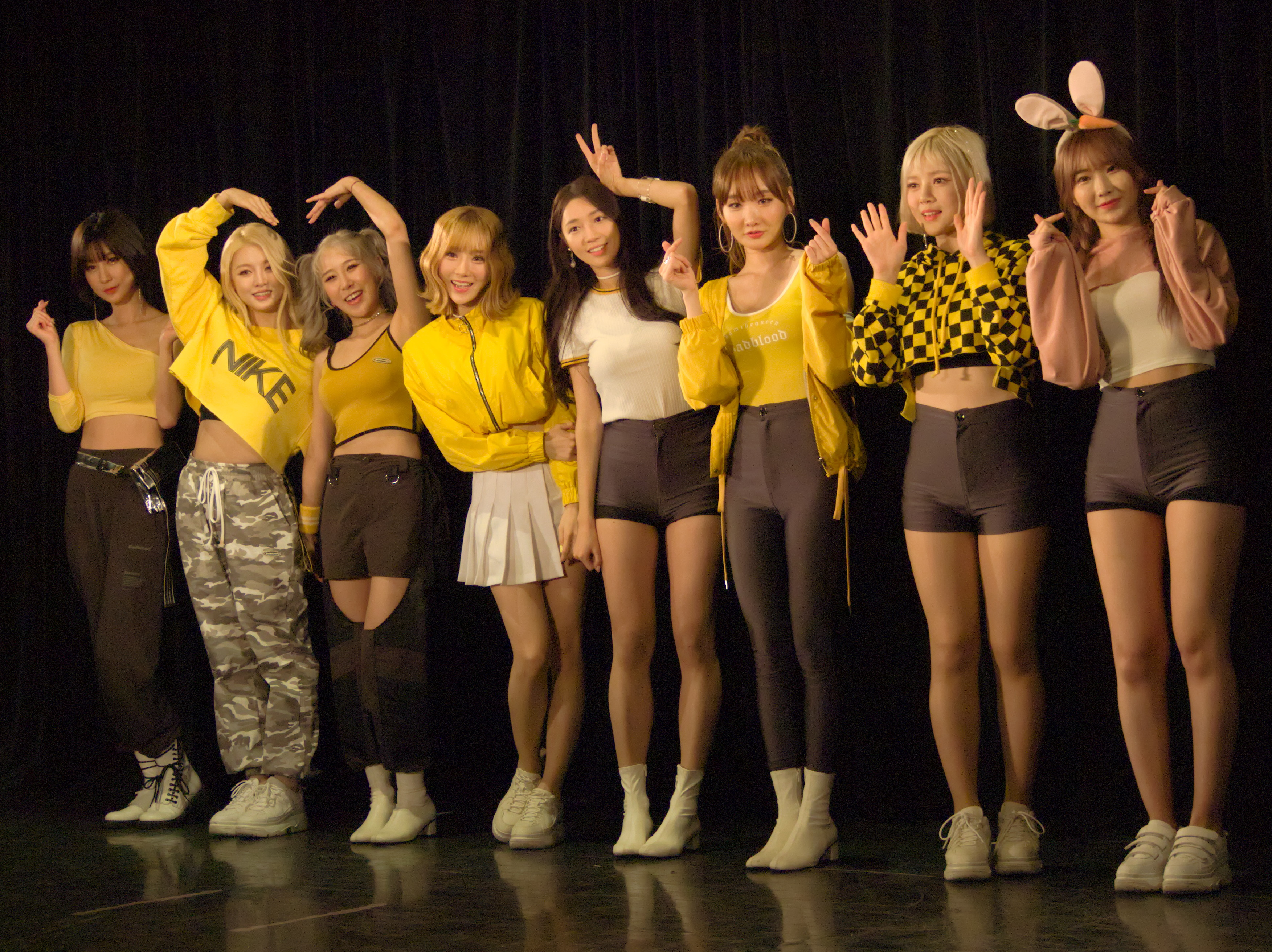 WeGirls